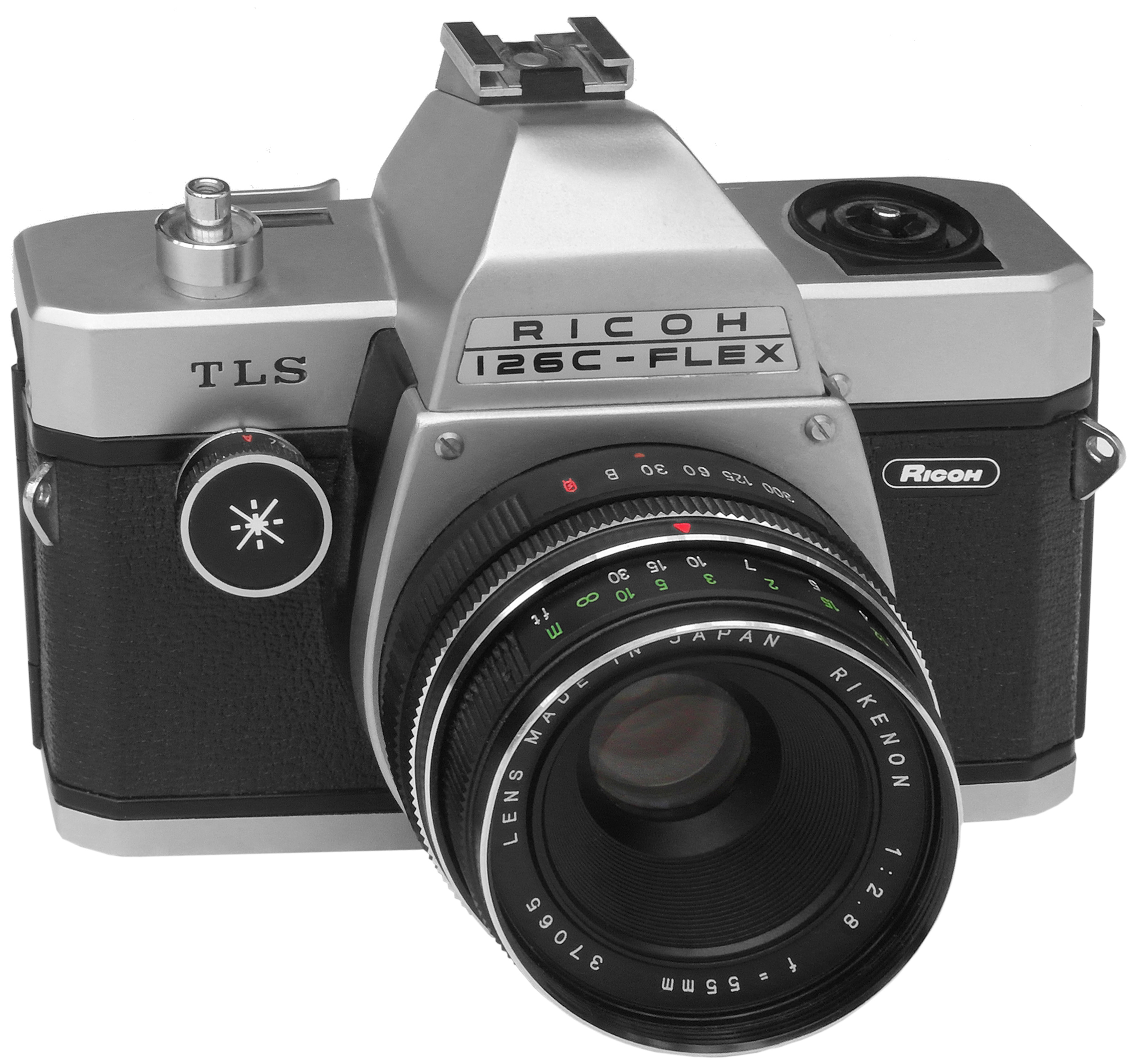 Nicht viele Kamerahersteller wagten es, eine Spiegelreflexkamera für das 126er-Kassettenformat herauszubringen. Kodak versuchte es mit der Instamatic Reflex, Zeiss Ikon mit der Contaflex 126 und Rollei hatte ein ganz eigenes Design mit der Rolleiflex SL 26. Großer Erfolg war ihnen nicht beschieden, die Instamatic-Kassette konnte sich als anspruchsvolles Filmformat nicht durchsetzen. Zum Teil lag das an der Filmführung in der Kassette: eine fehlende Andruckplatte verhinderte die genaue Planlage des Films. Nichtsdestotrotz hatte aber auch Ricoh 1969 den Mut, mit dieser 126C-Flex eine SLR für das 126er Format auf den Markt zu werfen. Die Ausstattung konnte sich sehen lassen: Blendenautomatik mit Zeitvorwahl, auch auf manuell umstellbar, Belichtungsmessung durch das Objektiv, Blitzschuh und Sockel für Blitzwürfel. Die Zeiten des Copal-Hinterlinsenverschlusses reichten von 1/30 bis 1/300. Die Werte des Belichtungsmessers wurden in einem kleinen Fenster auf der Kameraoberseite angezeigt. Es genügte ein Schwung mit dem Filmtransporthebel, um den Film ein Bild weiterzudrehen. Das Standardobjektiv Rikenon 2.8/55 war mit einem proprietären Schraubanschluss an der Kamera befestigt, es konnte gegen ein 35er oder ein 100er Wechselobjektiv ausgetauscht werden. Die Energie für die Blitzwürfel lieferte eine 15-Volt-Batterie (PX74), für die Belichtungsmessung genügte eine 675er Quecksilber-Knopfzelle, jetzt ersetzbar durch eine Hörgeräte-Batterie.